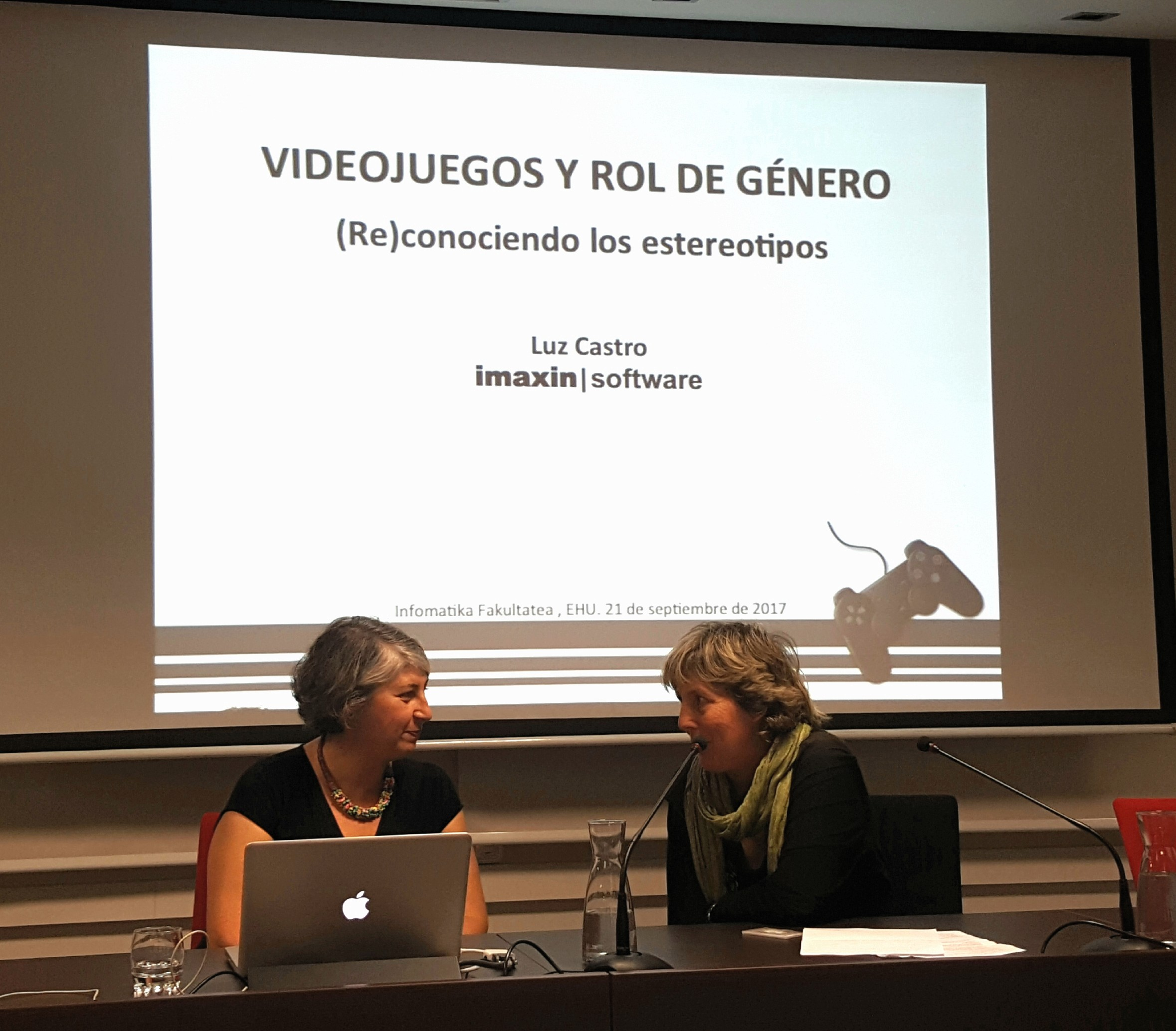 Luz Castro informatikaria hitzaldi bat ematen Donostian